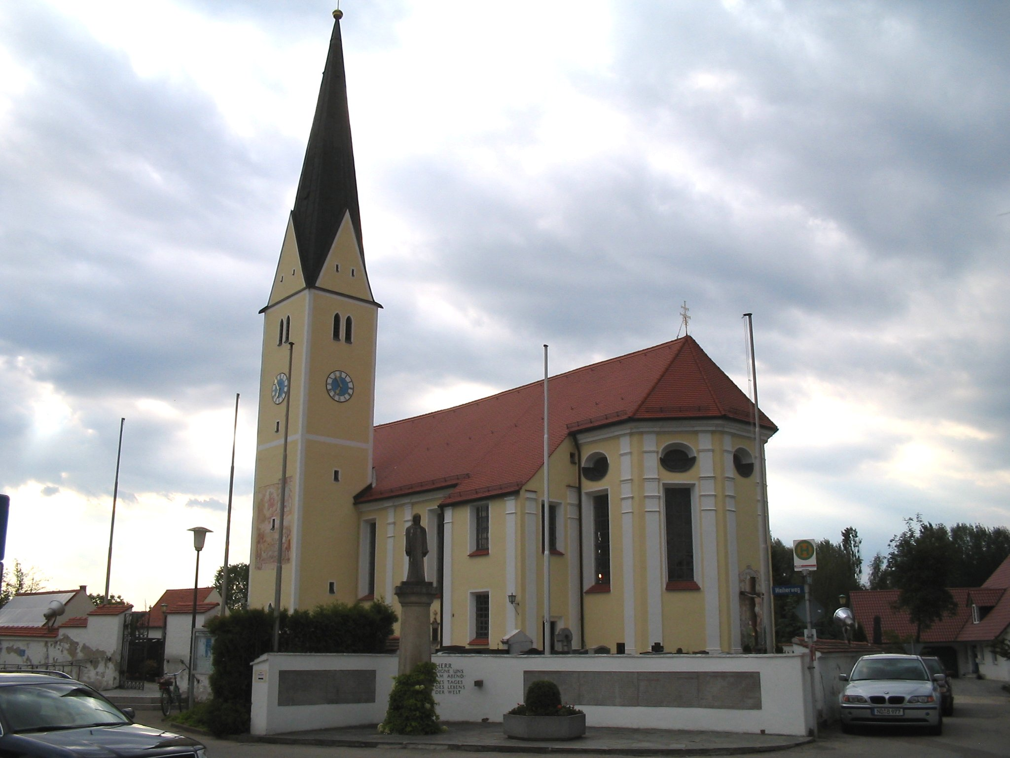 Pfarrkirche Mariä Reinigung und Sankt Wendelin in Waidhofen (Bayern)